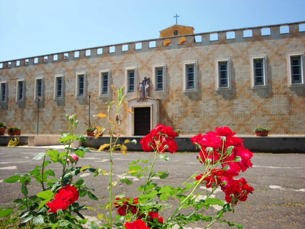 Fachada de la Capilla del Teresianum